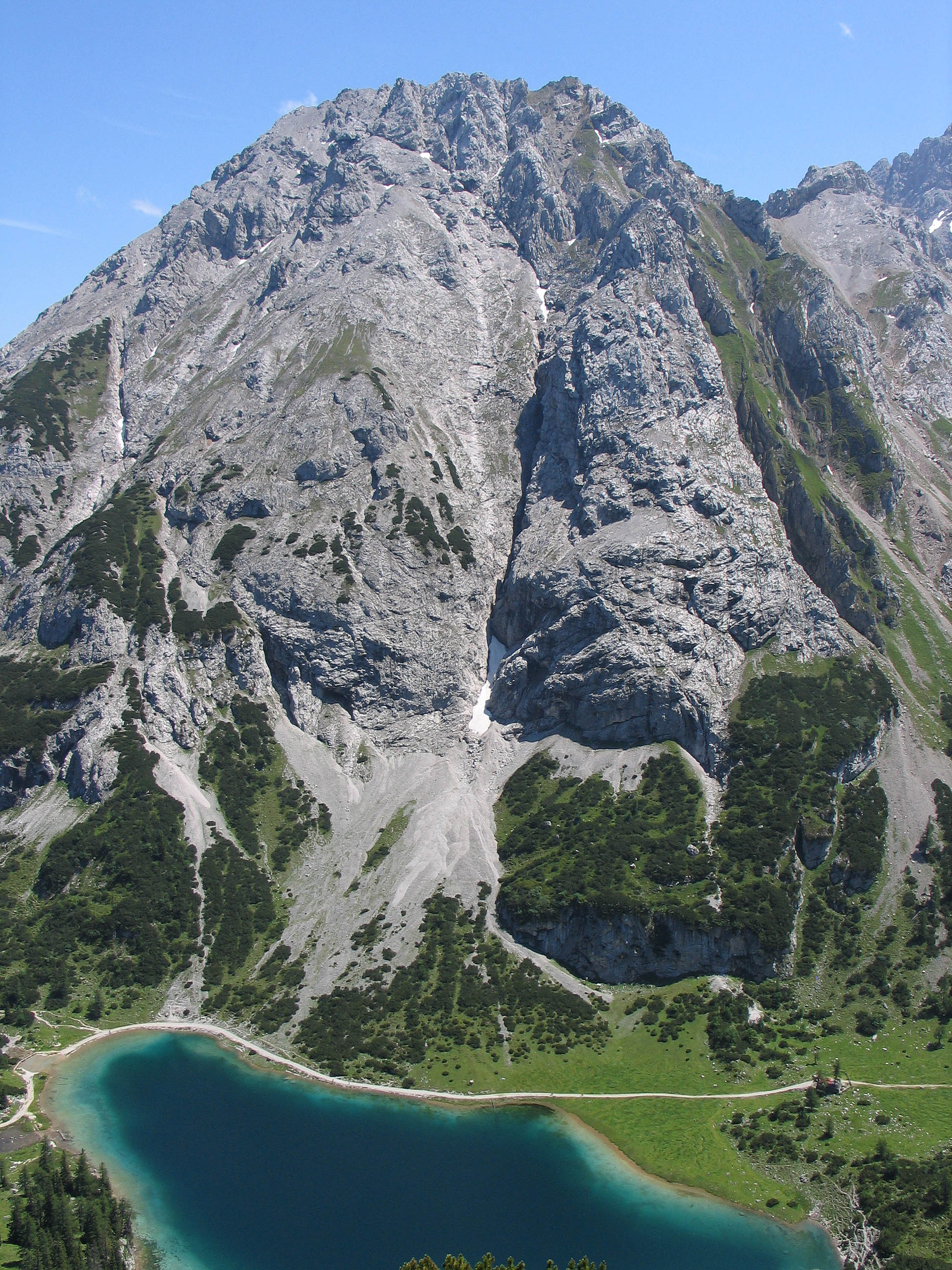 Vorderer Tajakopf, Mieminger Kette